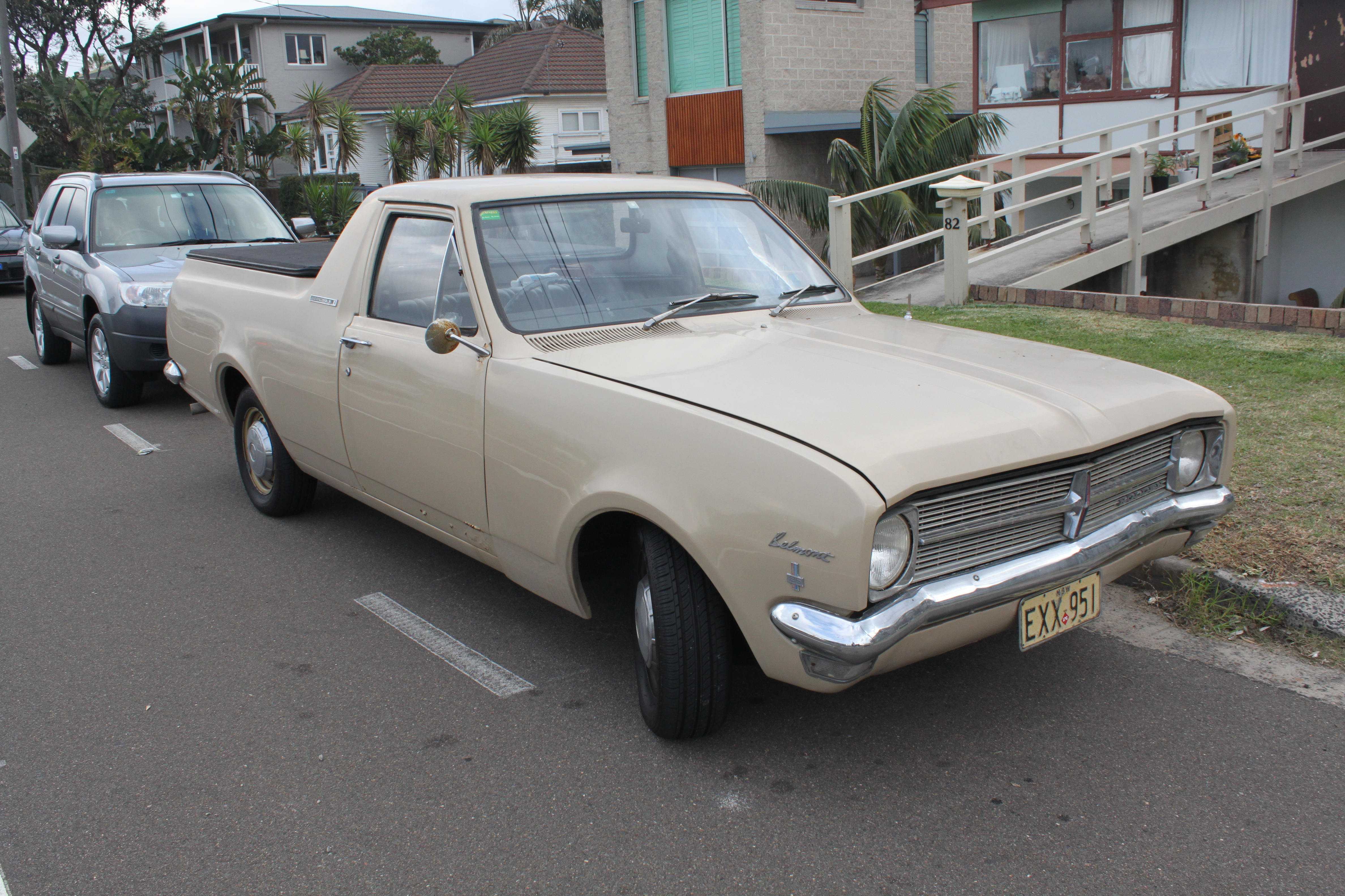 Holden HK Belmont Ute